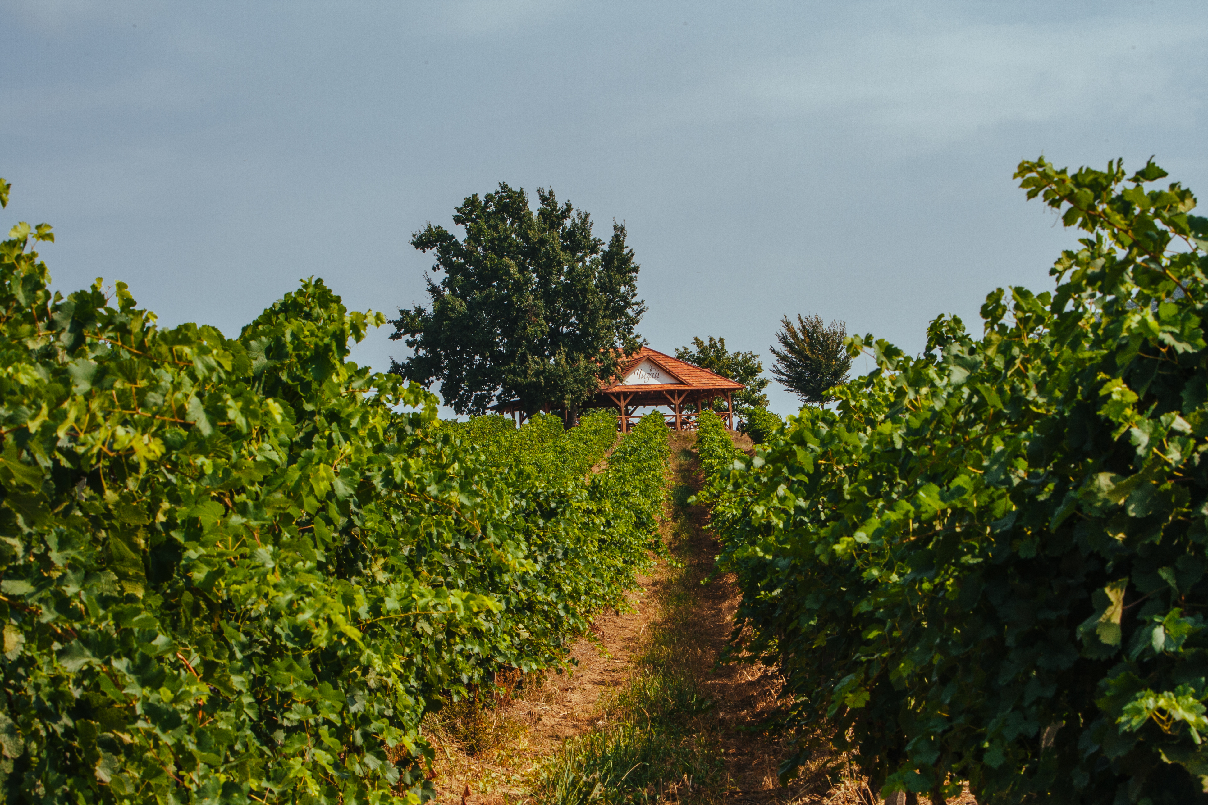 Виноградна плантація на Малій Горі поблизу Берегова (Закарпаття) з альтанкою